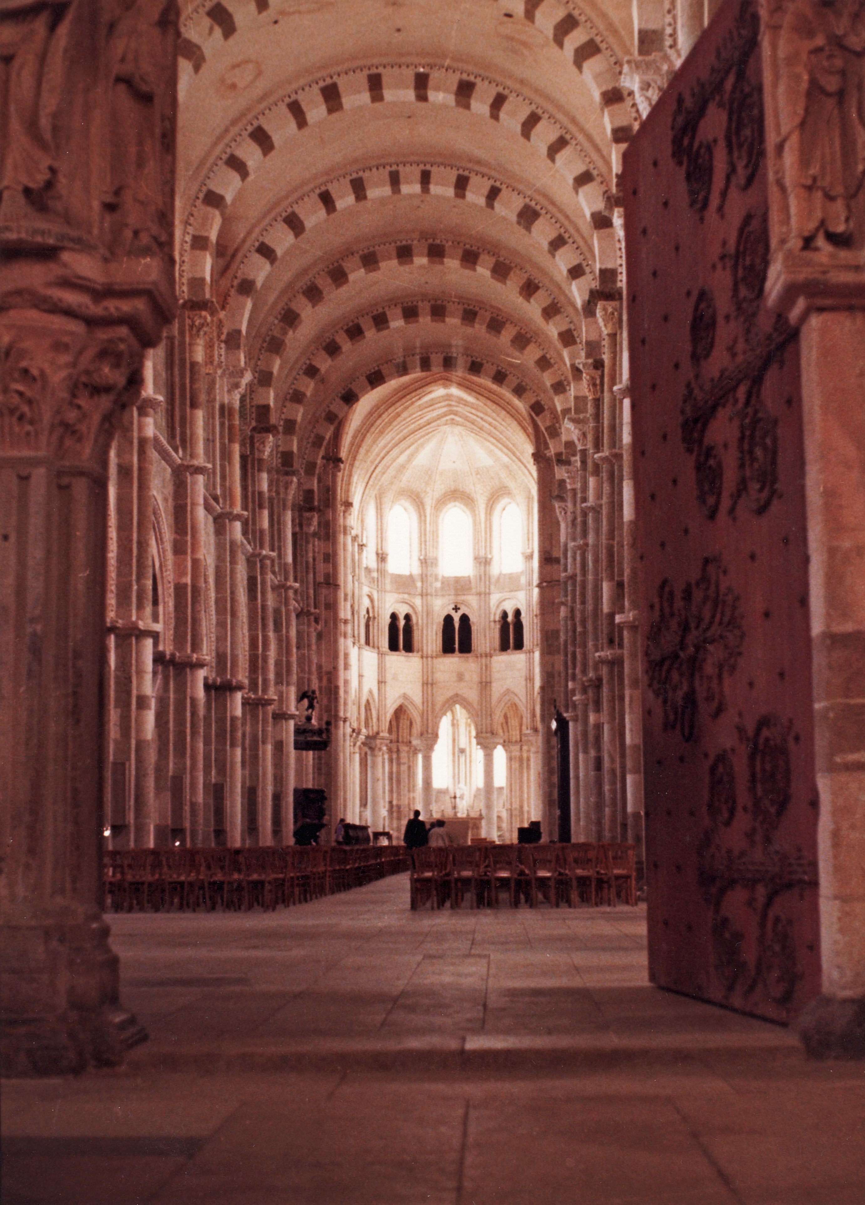 Basilique Sainte-Marie-Madeleine de Vézelay en 1981.